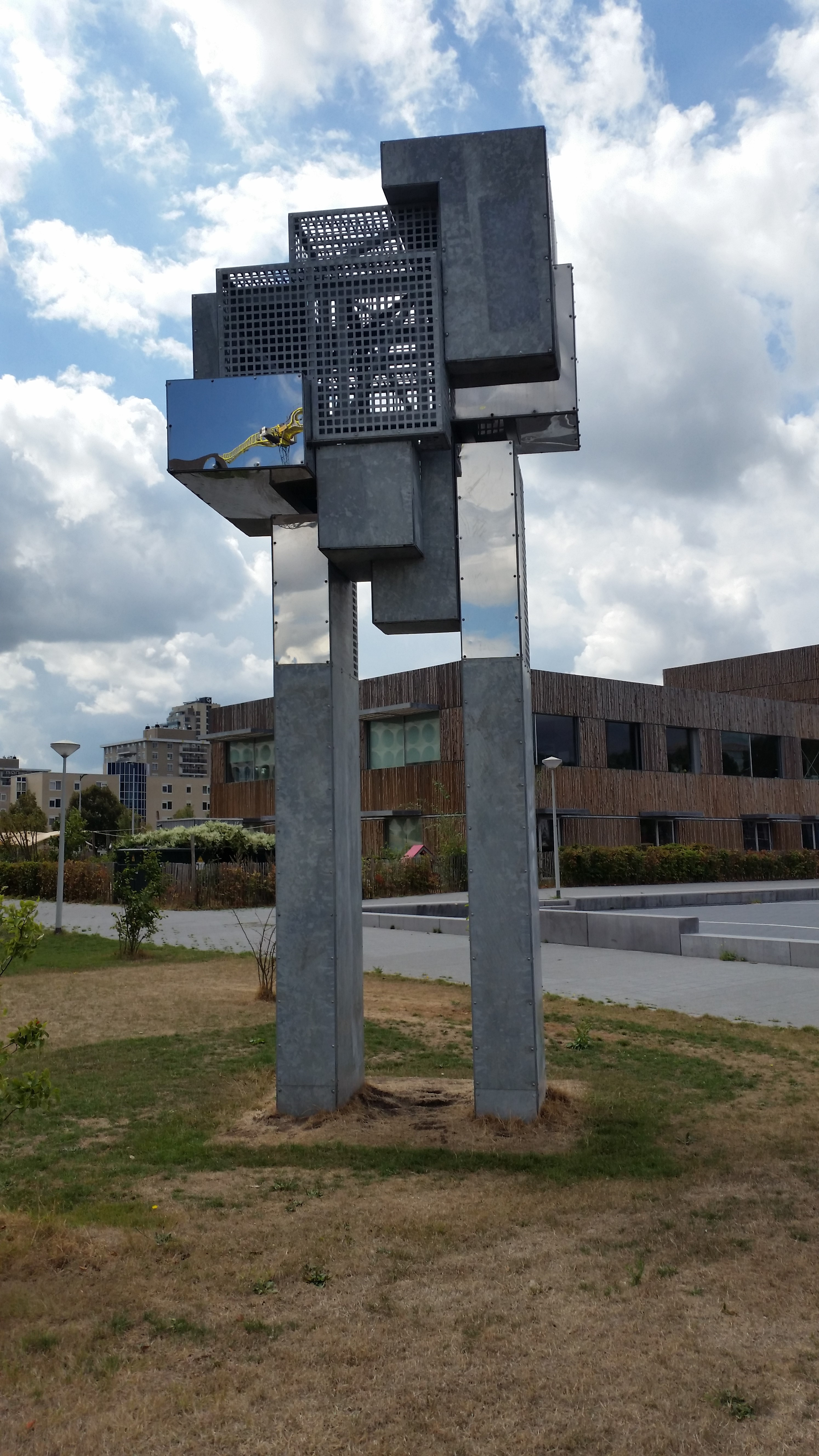 De wachter van Boris Tellegen aan de Antonio Vivaldistraat, Amsterdam-Zuid